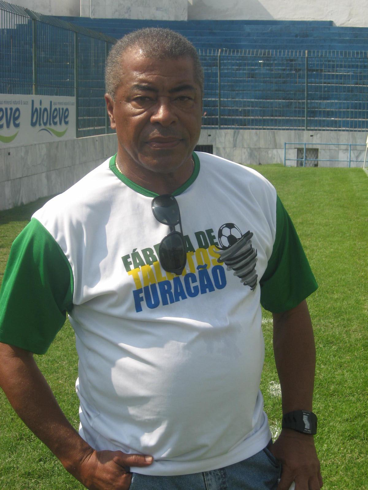 Jair Ventura Filho, o Jairzinho Furacão, em 2010.